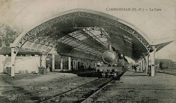 Gare de Lannemezan vers 1910